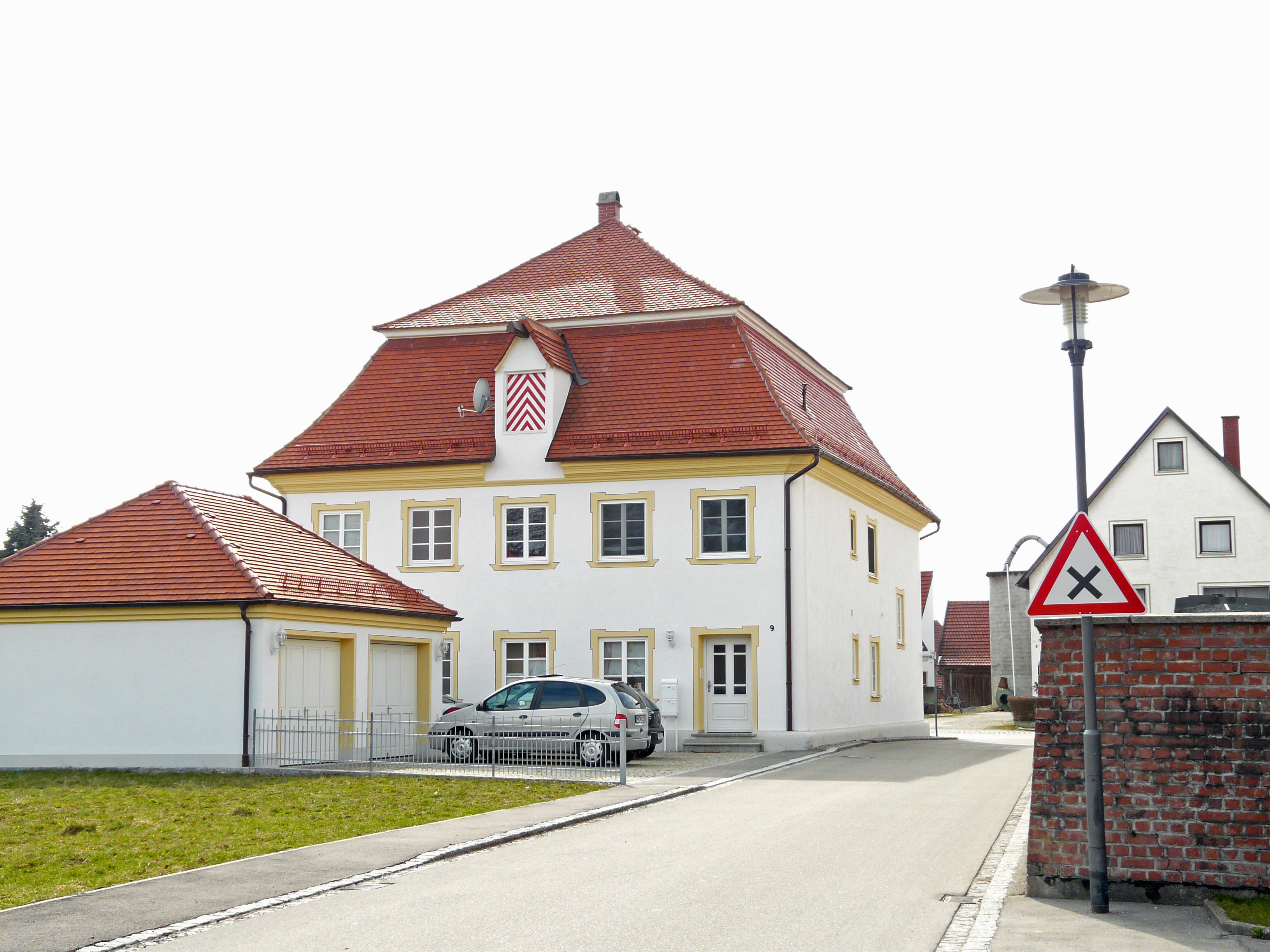 Pfarrhof in Nassenbeuren, Mindelheim